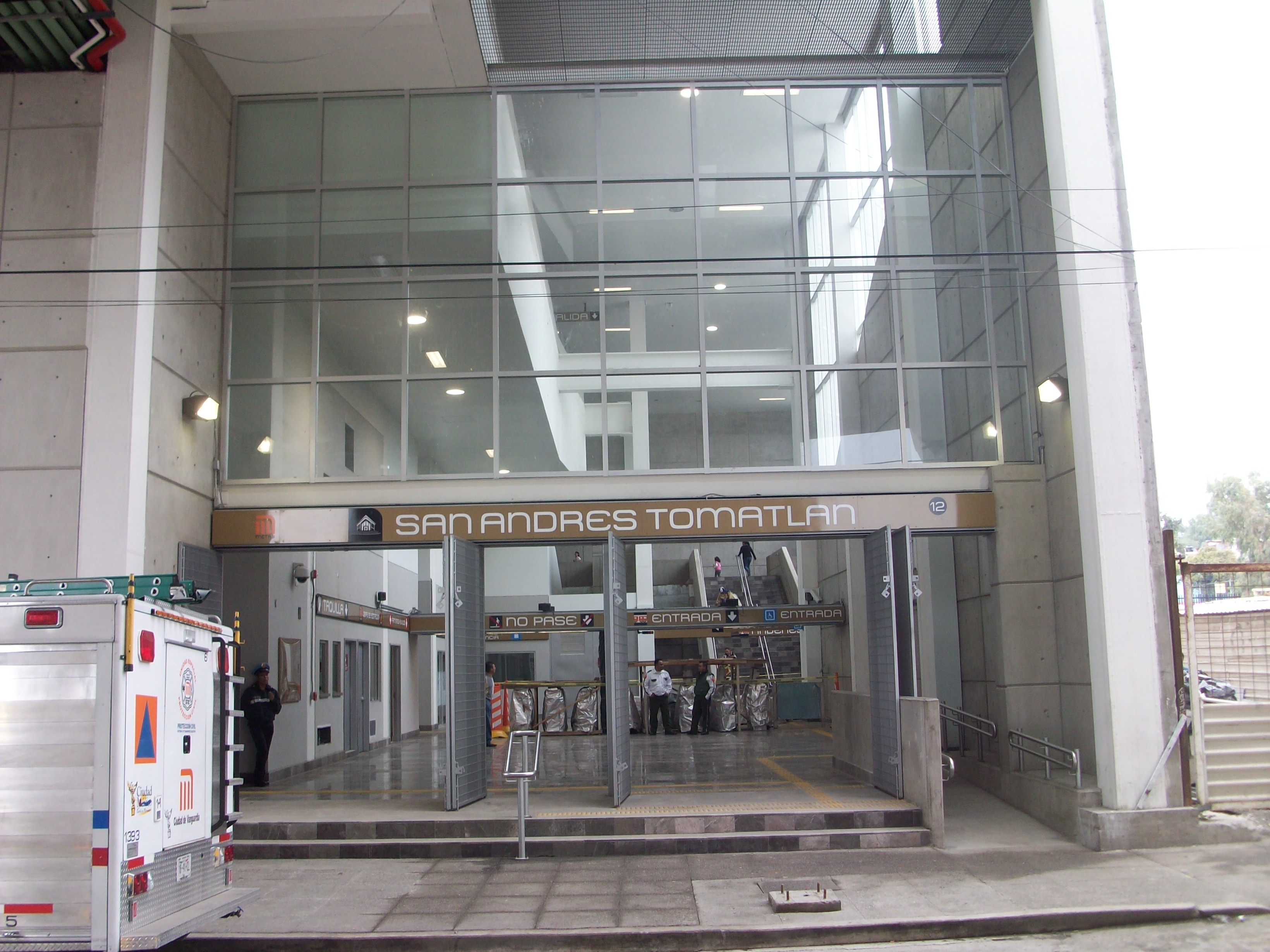 Acceso San Andres Tomatlan